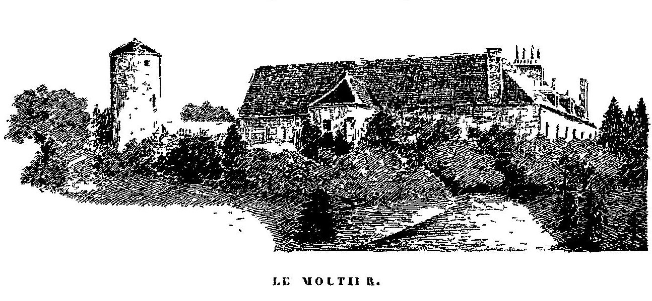 Le Prieuré du saint-Sépulcre de Jaligny - Gravure extraire de :Les fiefs du Bourbonnais (Tome 1 : Lapalisse), Aubert de La Faige et Roger de La Boutresse - 1896